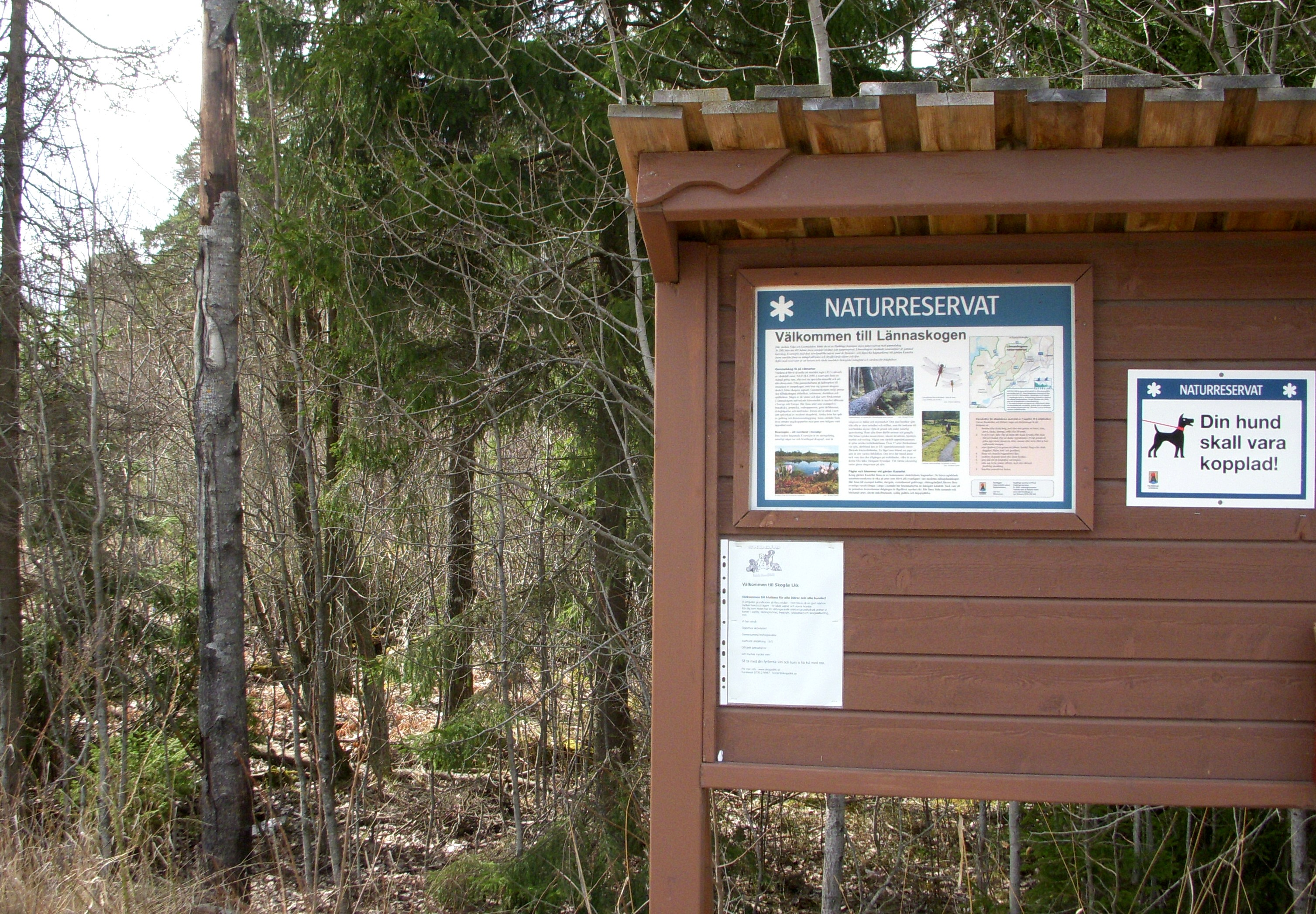 Lännaskogens naturreservat, skylt